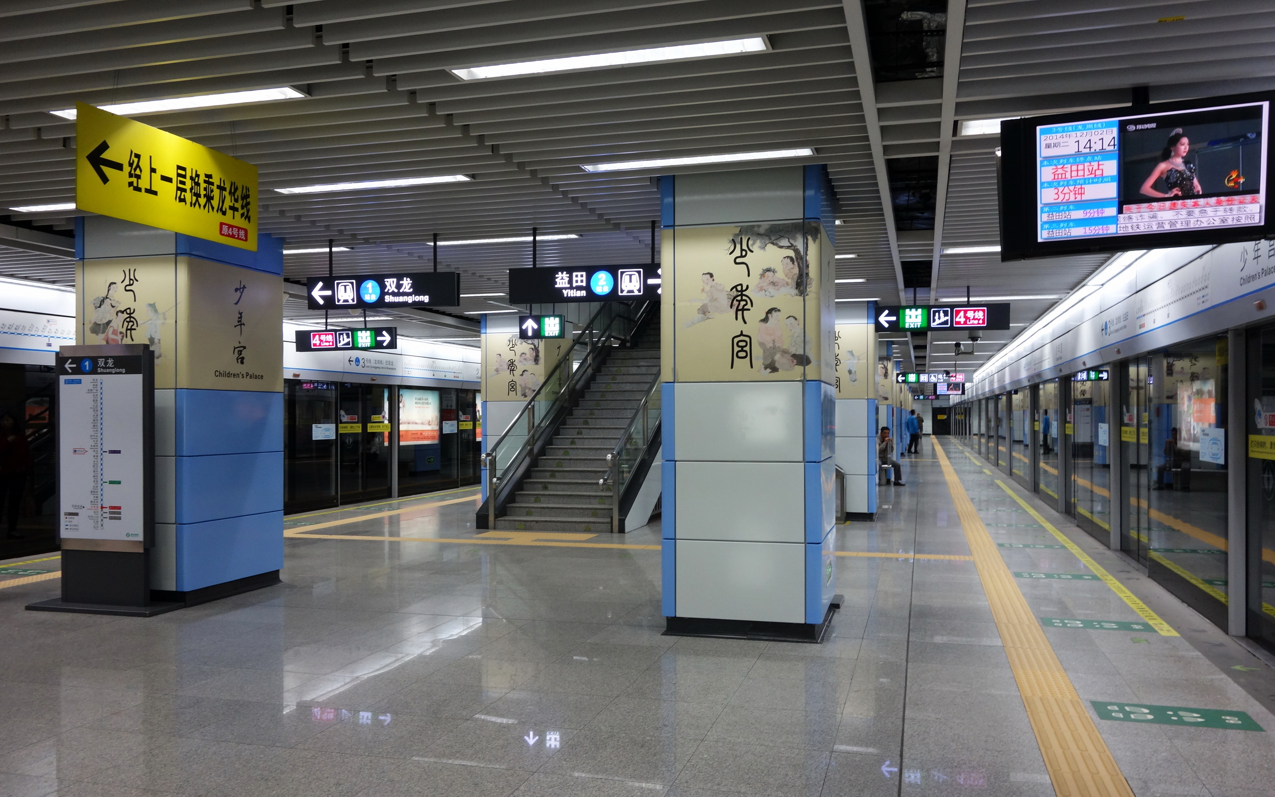 深圳地铁3号线(龙岗线)少年宫站的站台